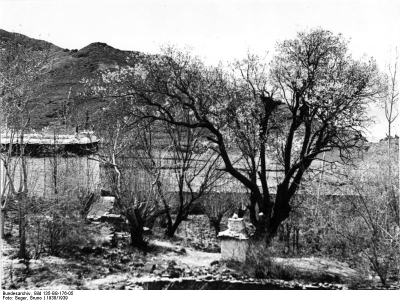 Kampadombo, Blick in den Park mit Kapelle, blühende Aprikosenbäume